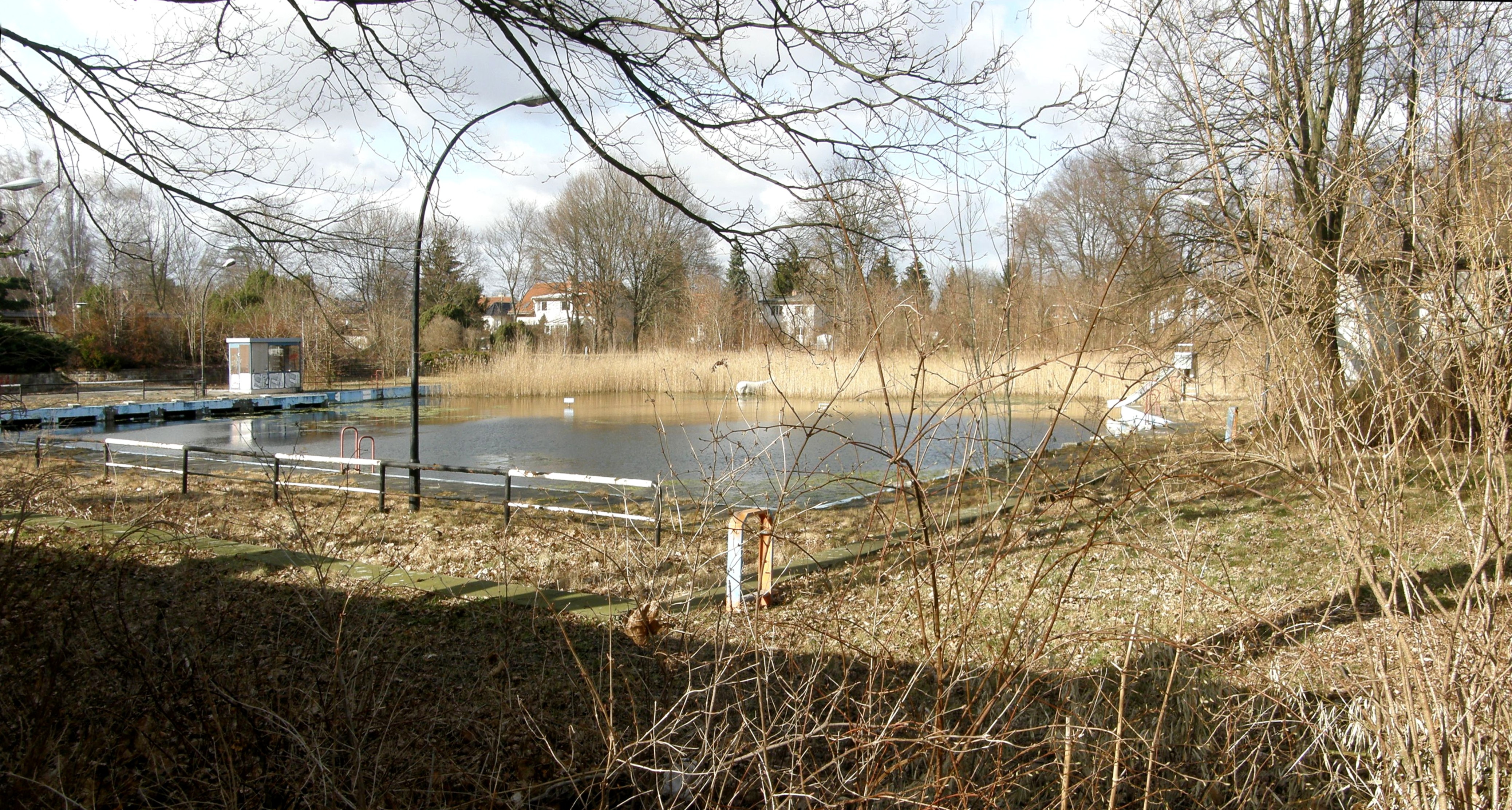 Berlin-Kaulsdorf, Ernst-Haeckel-Straße und weitere: das marode Wernerbad innenliegend